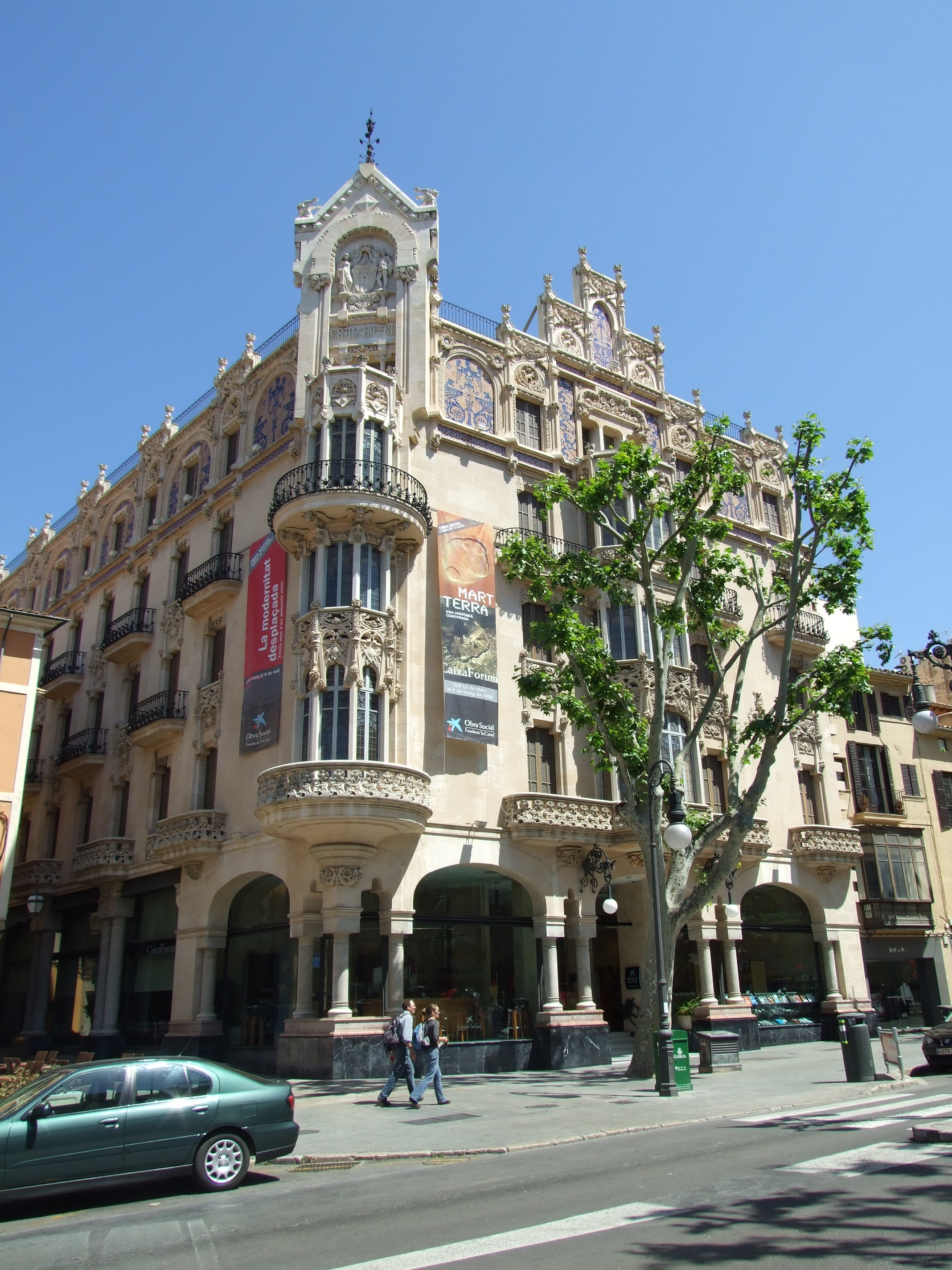 El Gran Hotel, Palma (Mallorca). Edifici modernista.